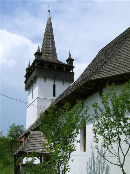 Kalotadámos református temploma